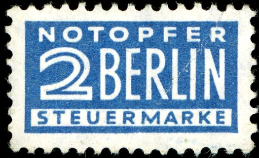 Deutsche Briefmarke - Berlin airlift notopfer stamp